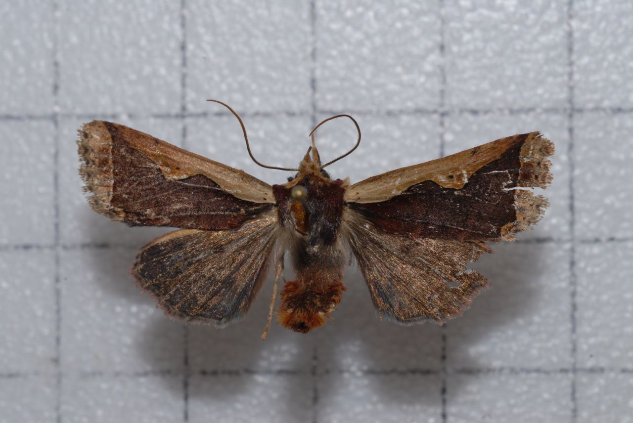 Rhynchaglaea hemixantha Sugi, 1980 分明長喙冬夜蛾 鞍1:P.103,Pl.27-3,36-4 台灣蛾類圖說5:P173